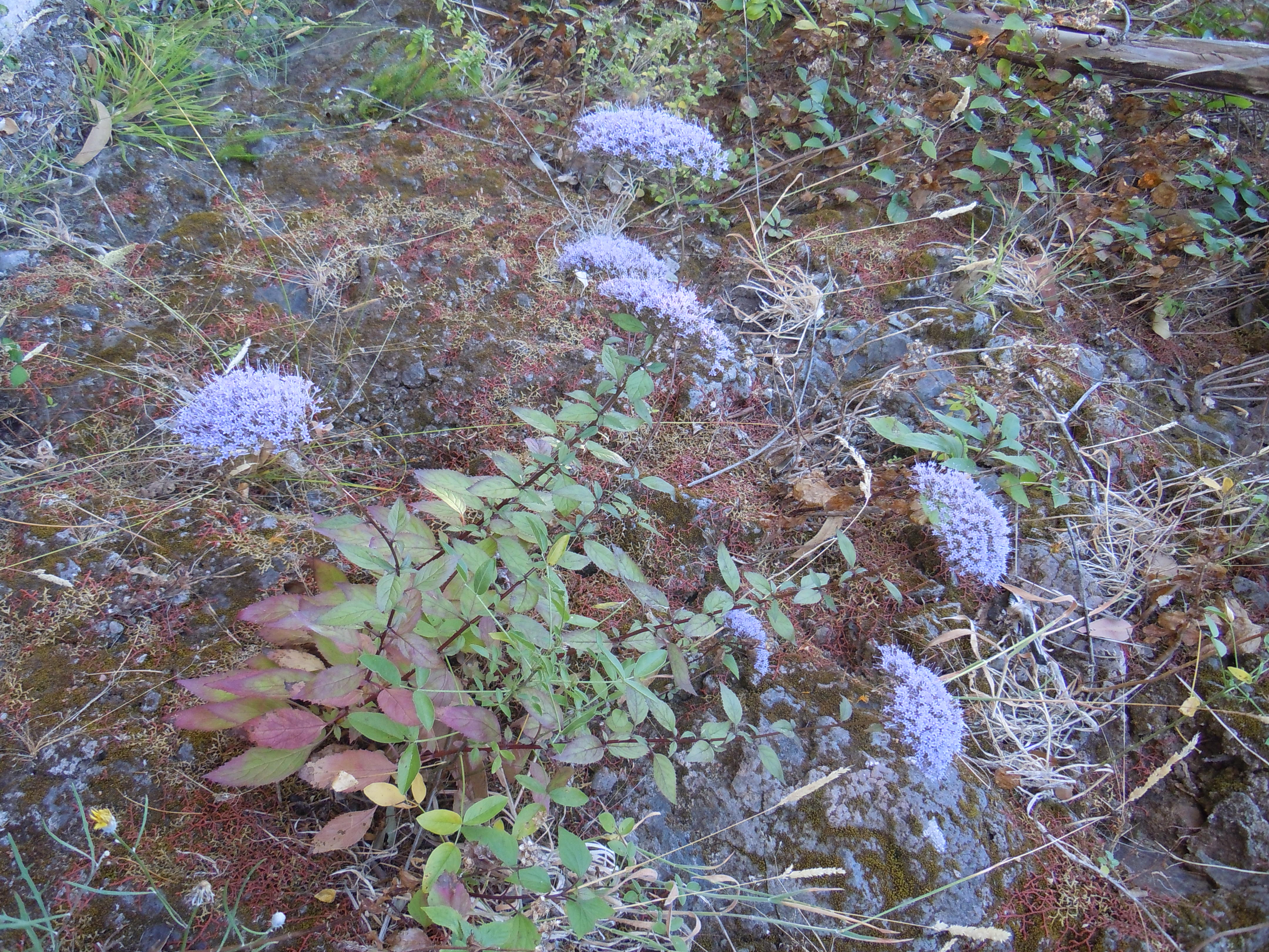 Trachelium caeruleum - Levada do Norte - Madere